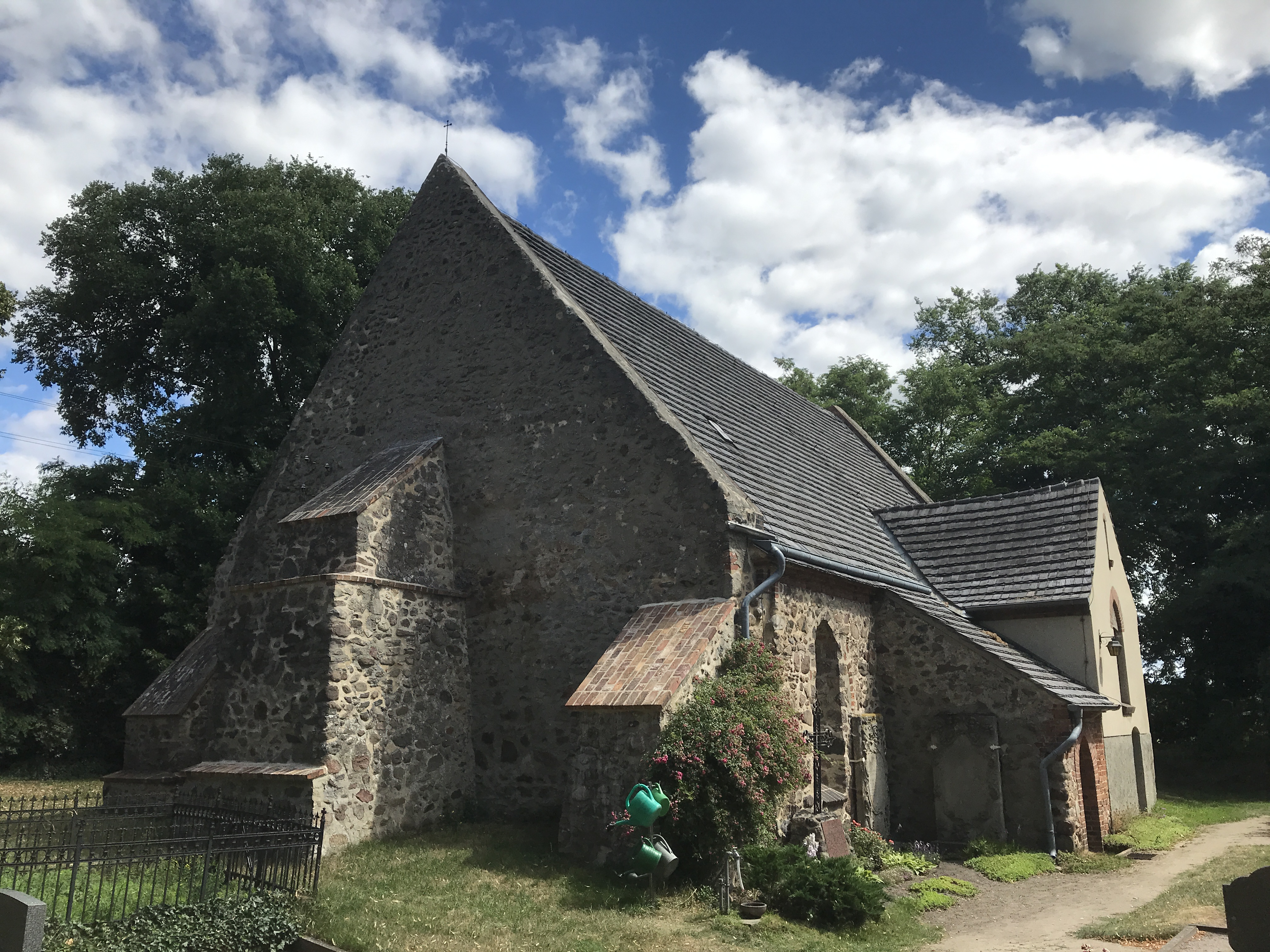 Die Dorfkirche in Altgolßen entstand Anfang des 14. Jahrhunderts und wurde in den Jahren 1899 bis 1902 erheblich umgebaut. Auf dem angrenzenden Friedhof befinden sich bedeutende Gräbdenkmäler aus den Patronatsfamilien des 18. und 19. Jahrhunderts.